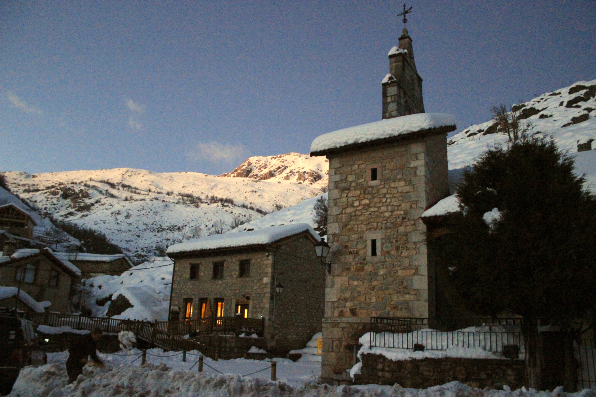 Iglesia y escuela en la pedanía de Las Salas (León)